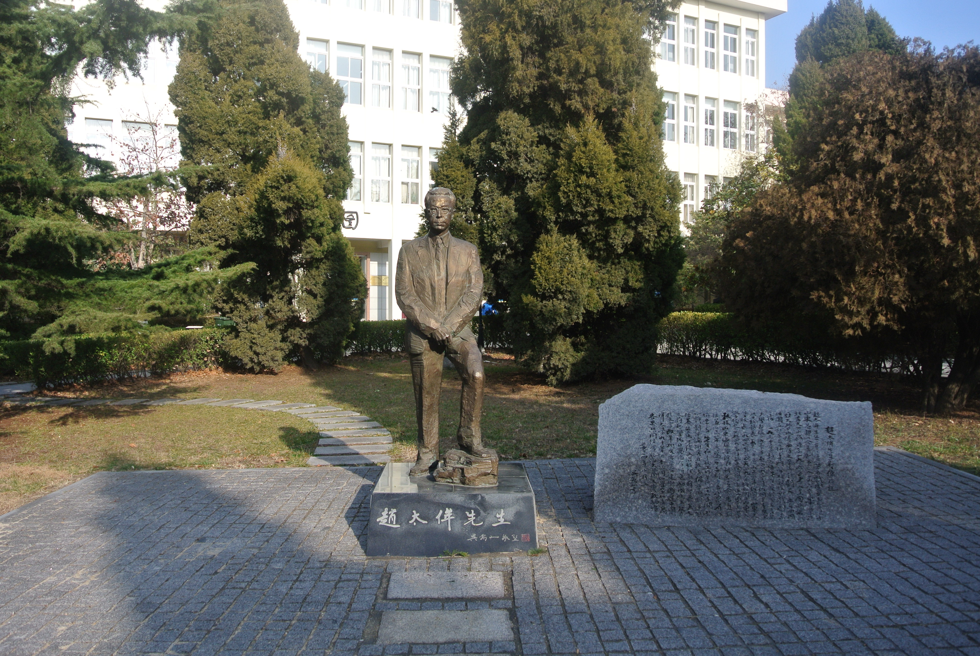 中国海洋大学鱼山校区赵太侔雕像